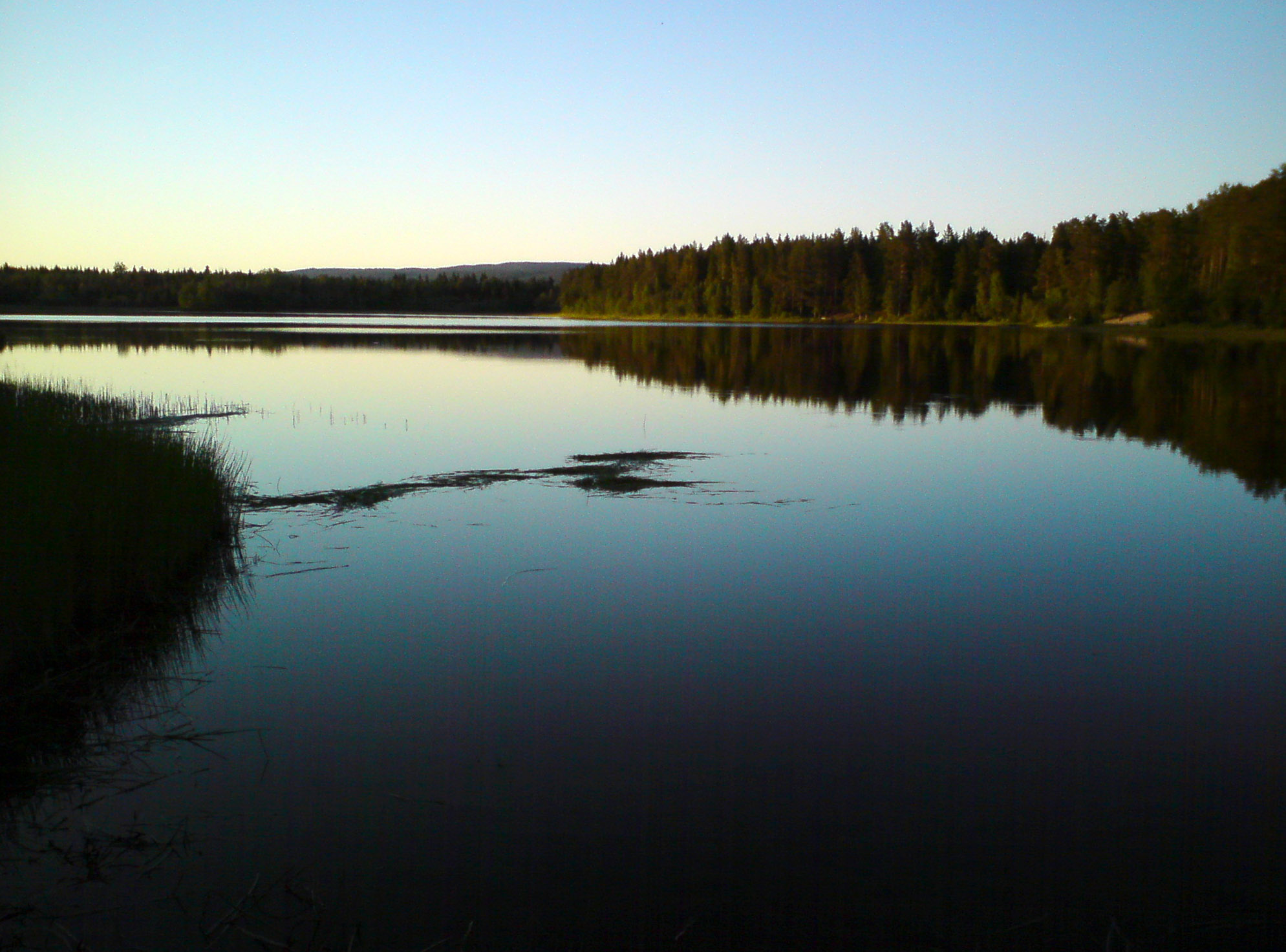 Lögdösjön, Timrå kommun, Foto: Alexander Öberg, 2009